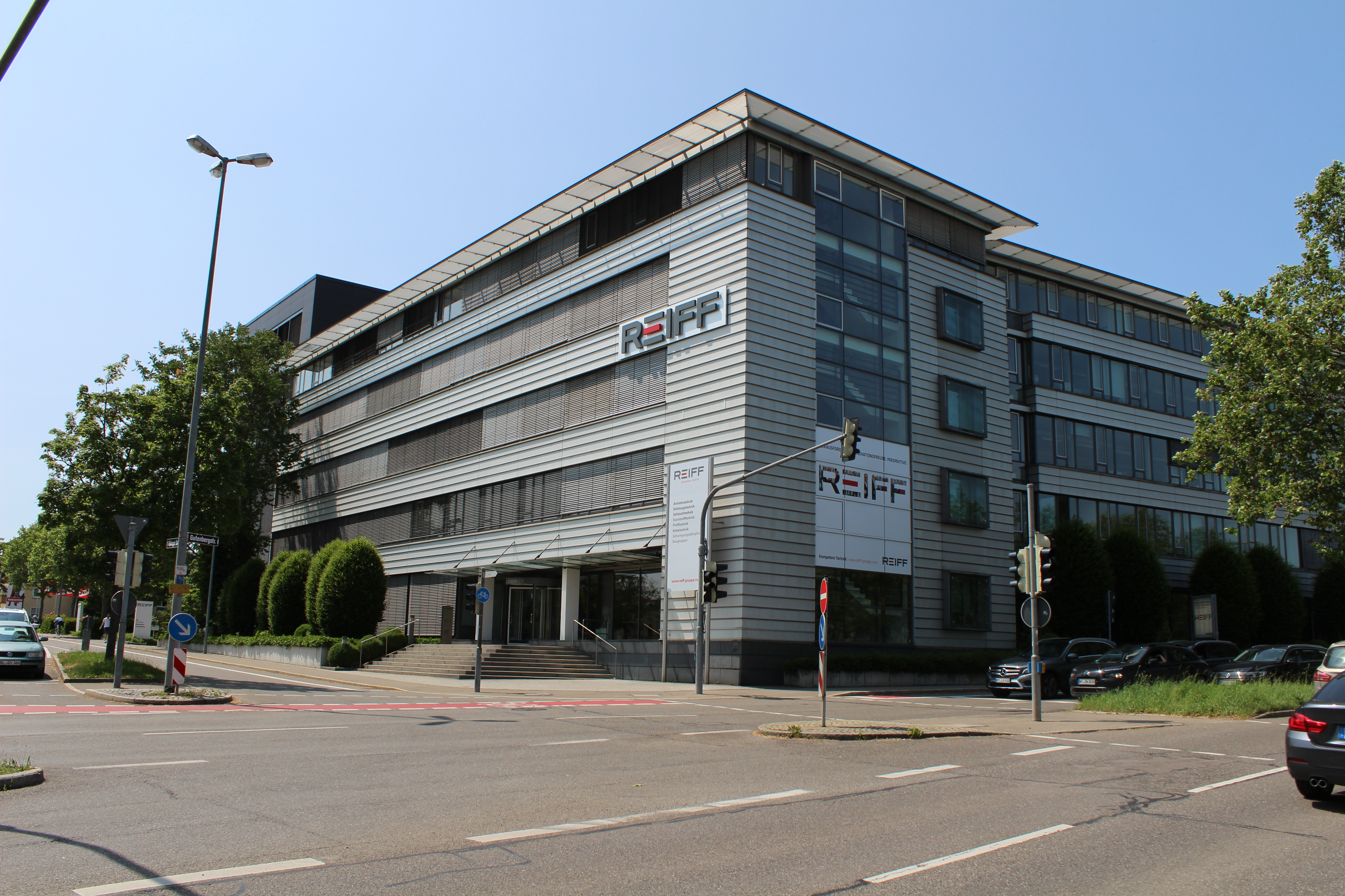 REIFF Gruppe 2019 Hauptverwaltung